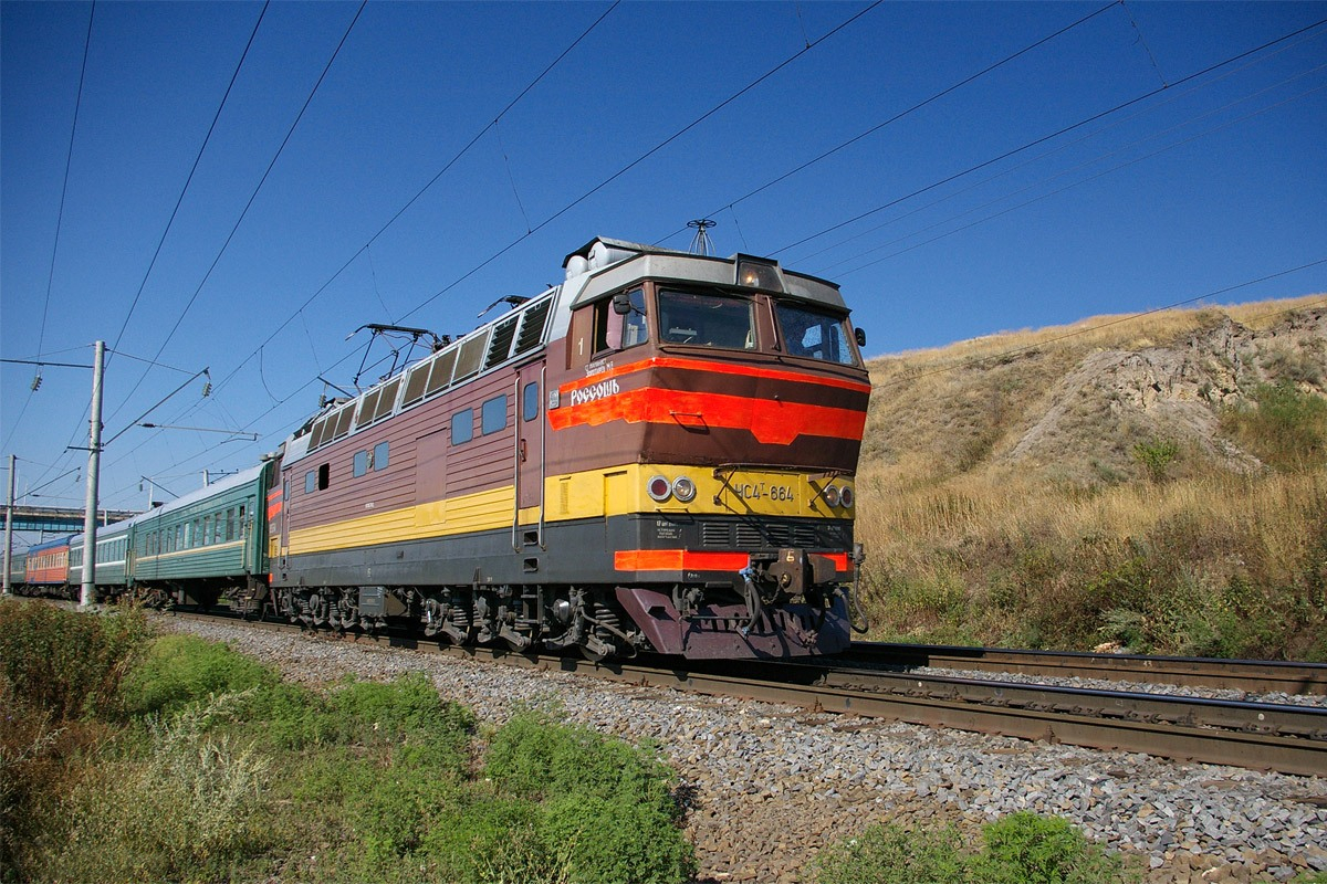 Электровоз ЧС4Т-664 с поездом, участок Кизитеринка - Аксай